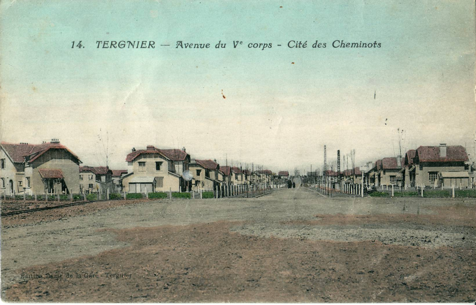 carte postale ancienne éditée par le Bazar de la Gare à Tergnier, N°14TERGNIER : avenue du Ve corps - Cité des Cheminots